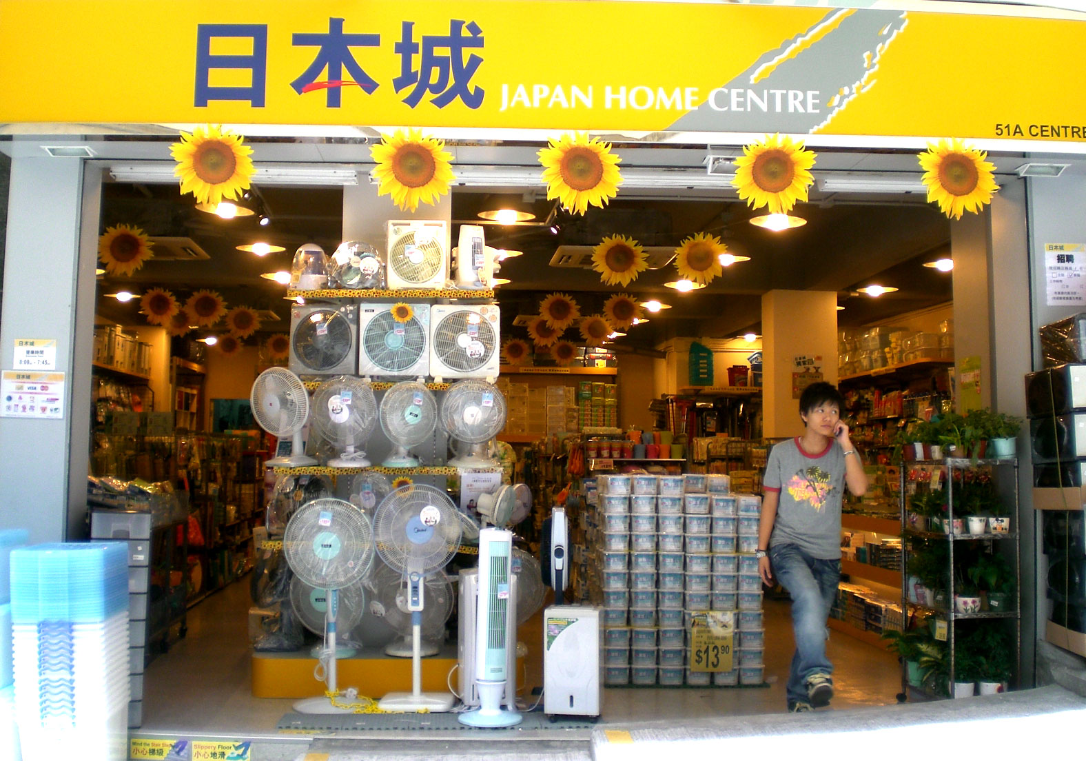 正街商店 - 日本城